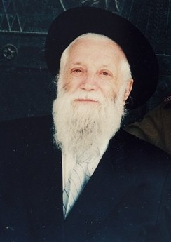 פנחס וסרמן היה רבה של דורוחוי שברומניה במשך כחמישים שנה, ולאחר עלותו לישראל שימש כרבם של יוצאי רומניה בישראל. התפרסם במאבקו לעלות לישראל.